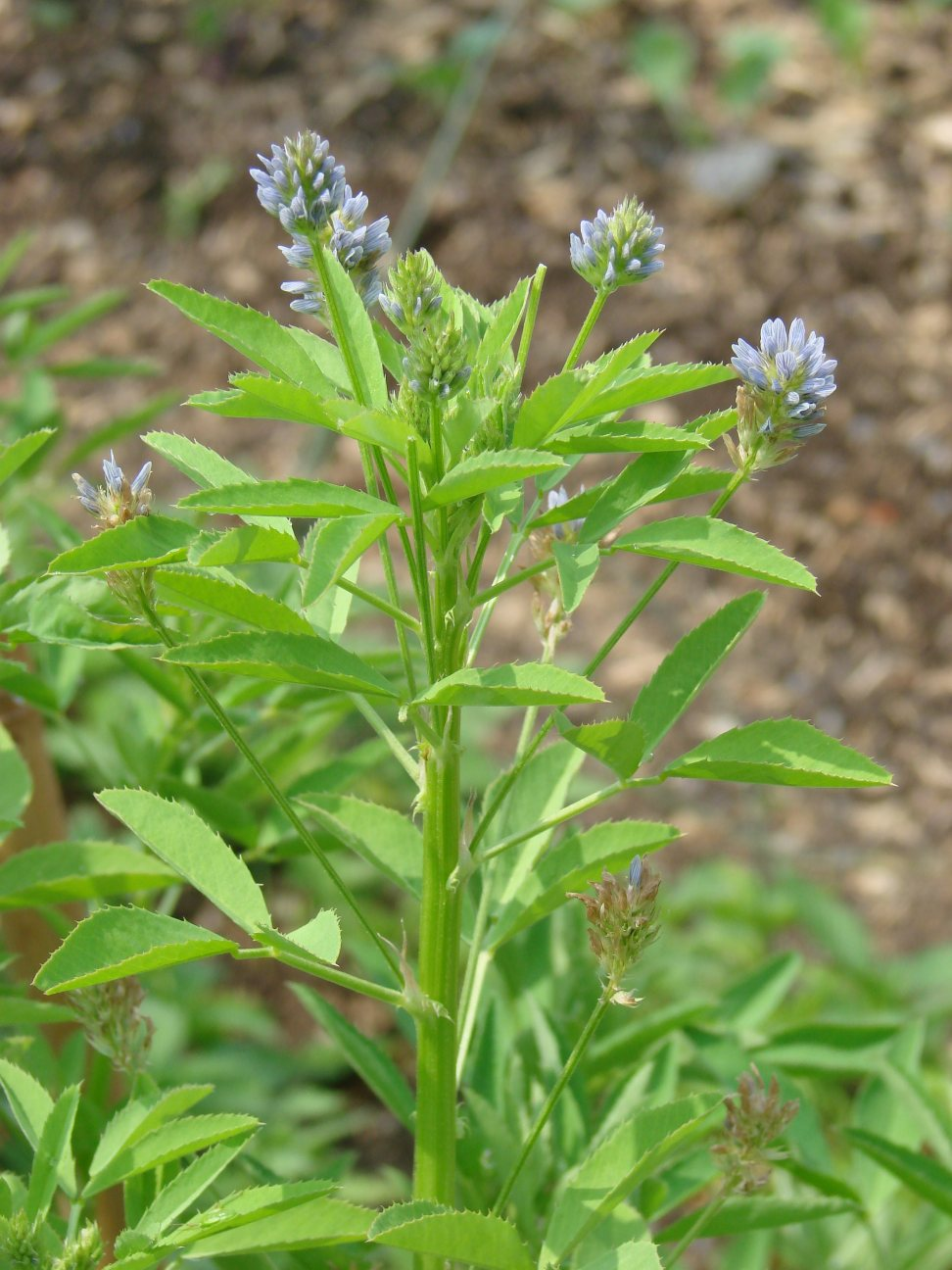 Trigonella coerulea